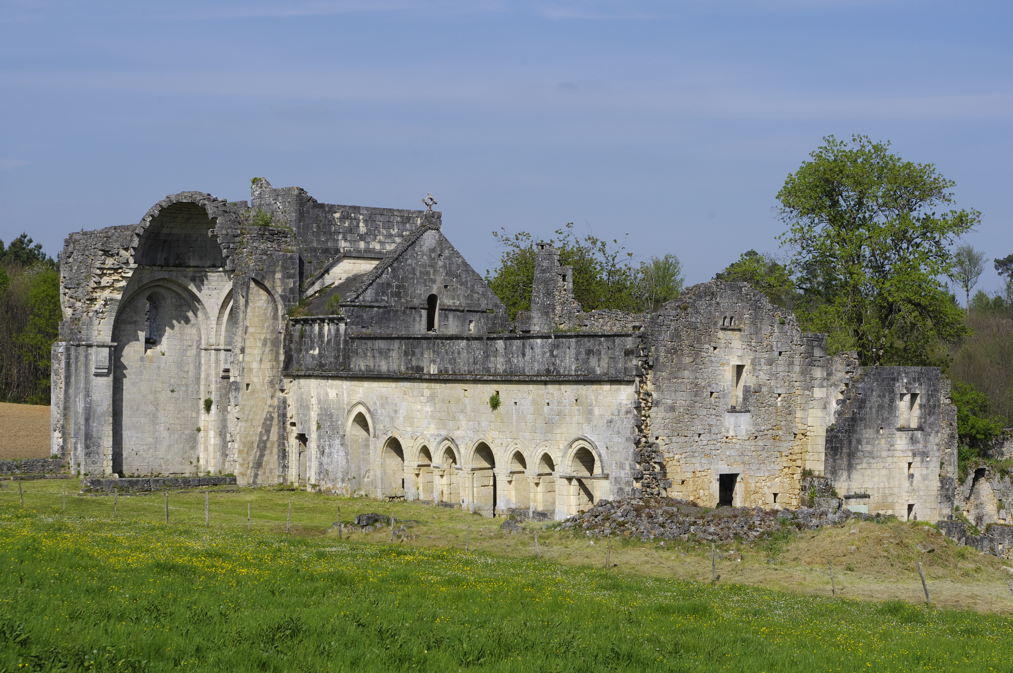 Ruines de l'abbaye de Boschaud, commune de Villars, Dordogne, France